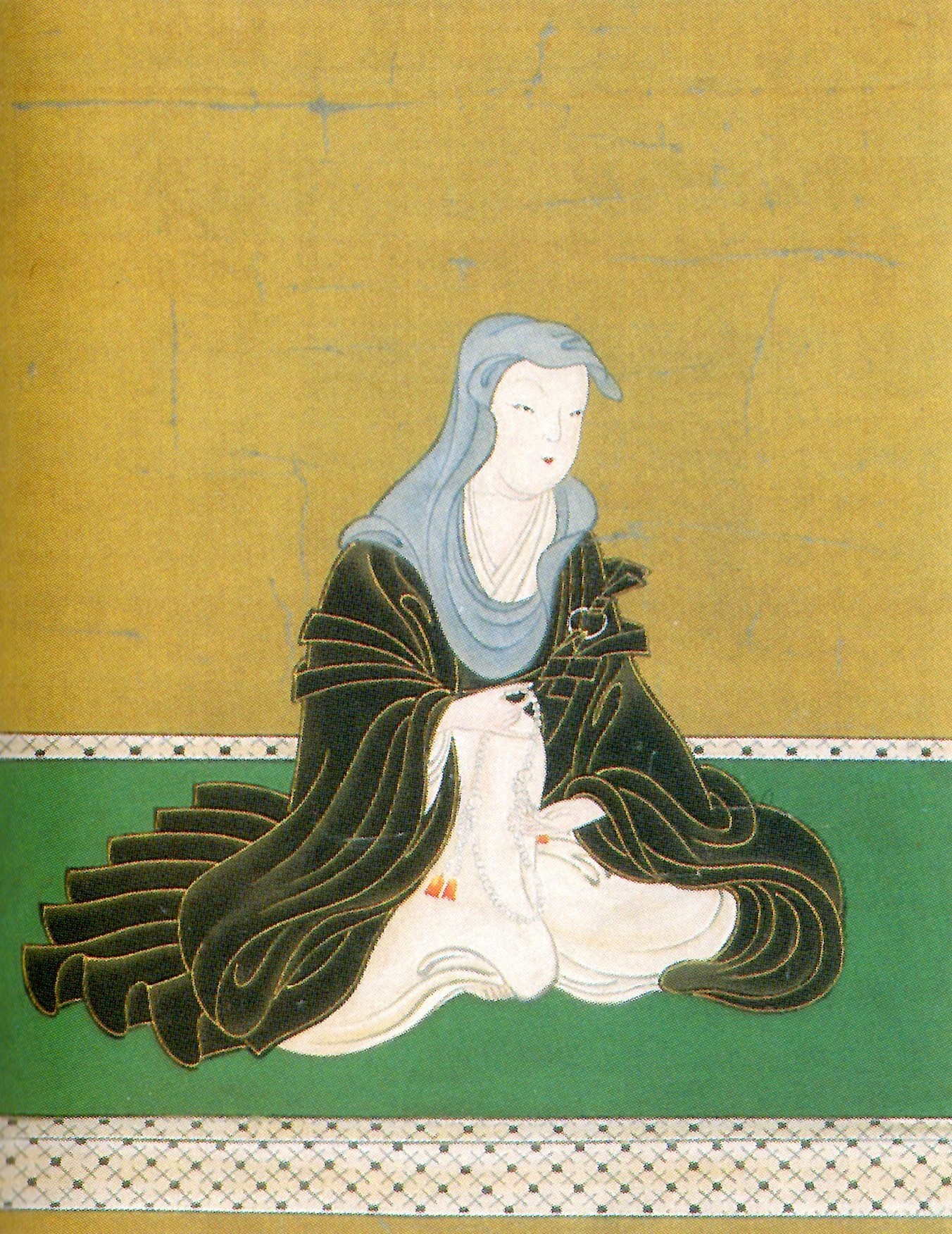 霊松院(源姫、淳子、鍋島重茂の正室、伊達宗村の娘)の肖像。